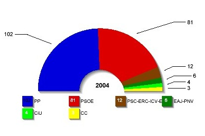 Grafik Ergebnis Parlamentswahlen zum Senat Spanien 2004